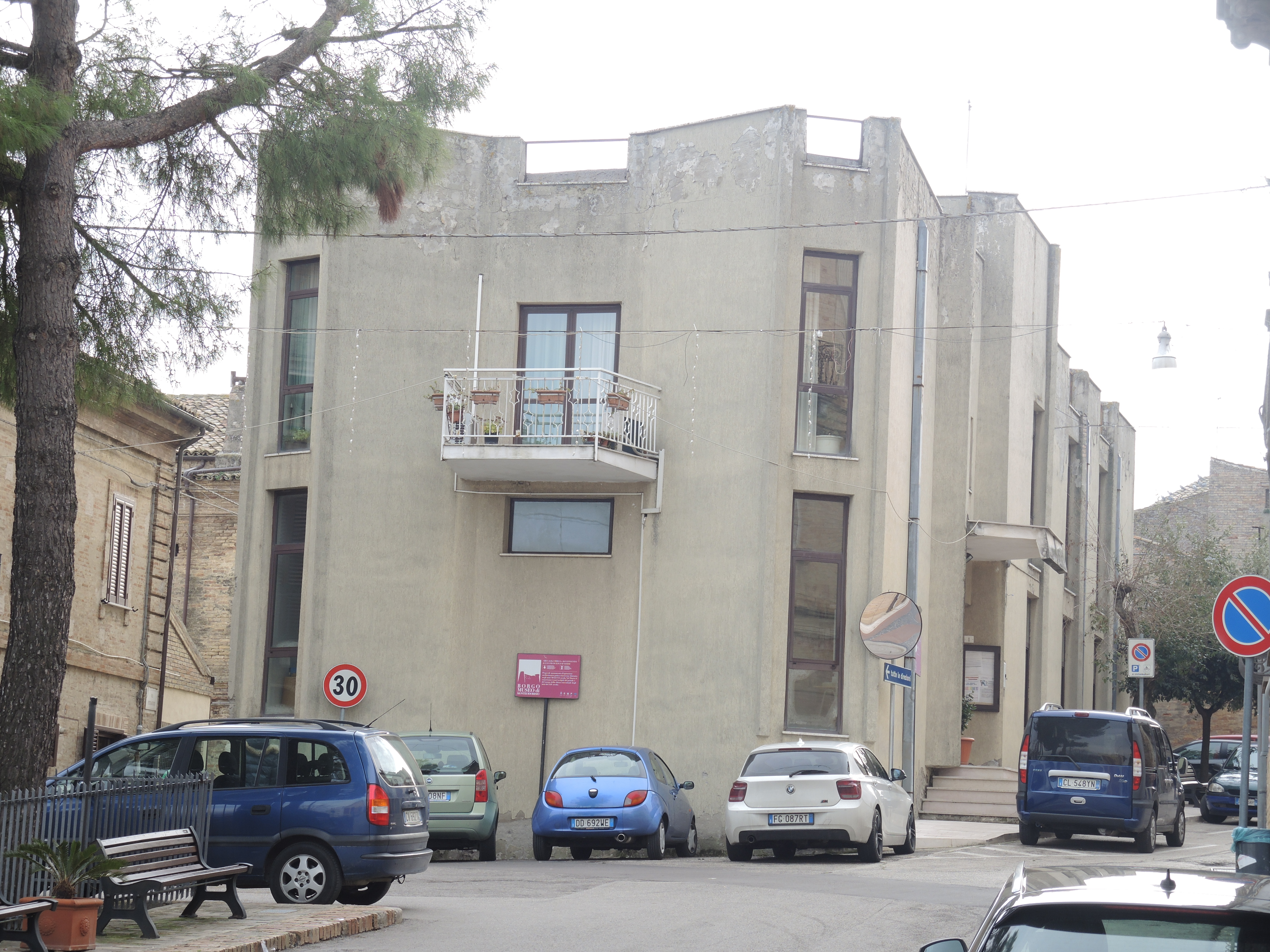 Monteodorisio